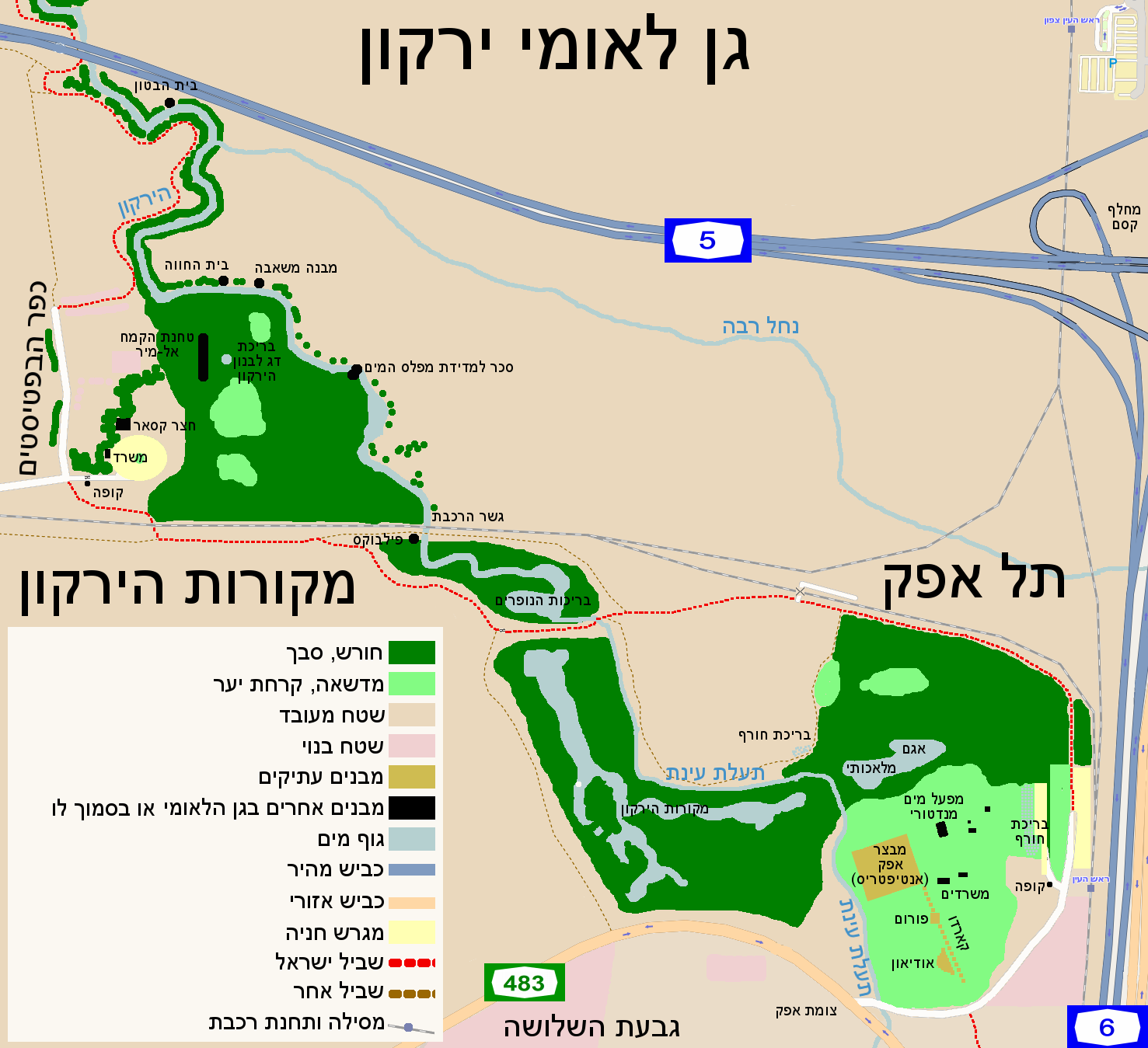 Carta PN Yarkon